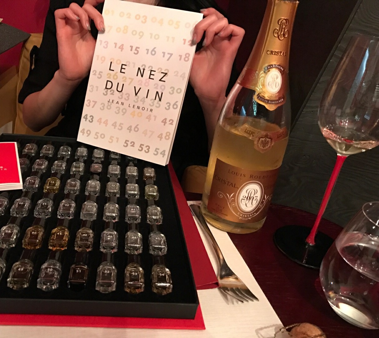 아로마키트